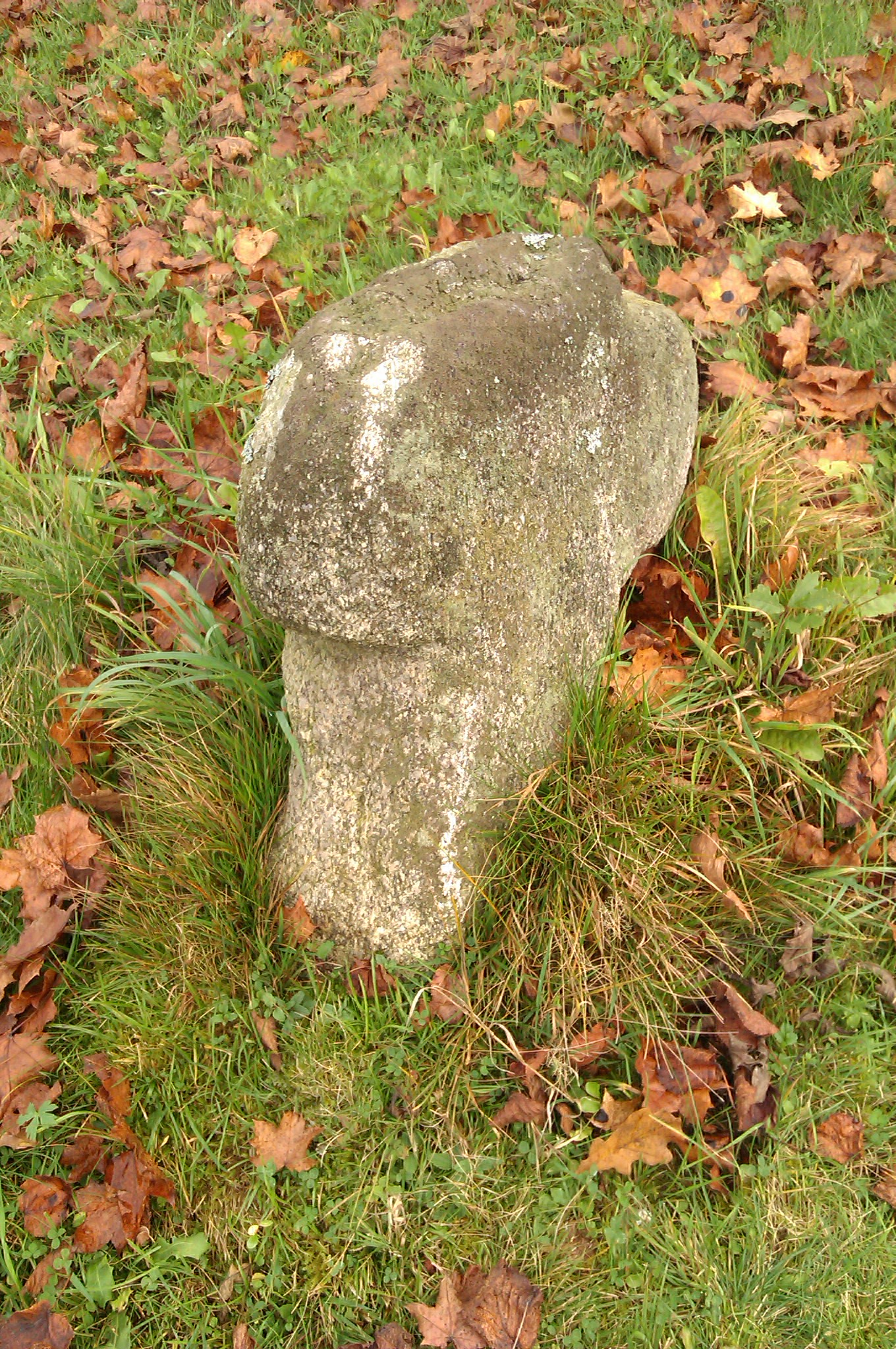 Steinkreuz bei der Kapelle bei Peugenhammer